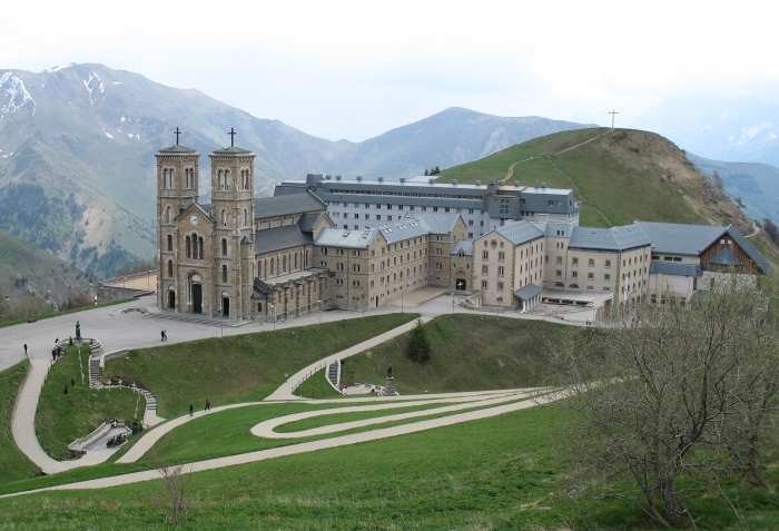 Panorama des Hameaux du Village de La Salette Fallavaux